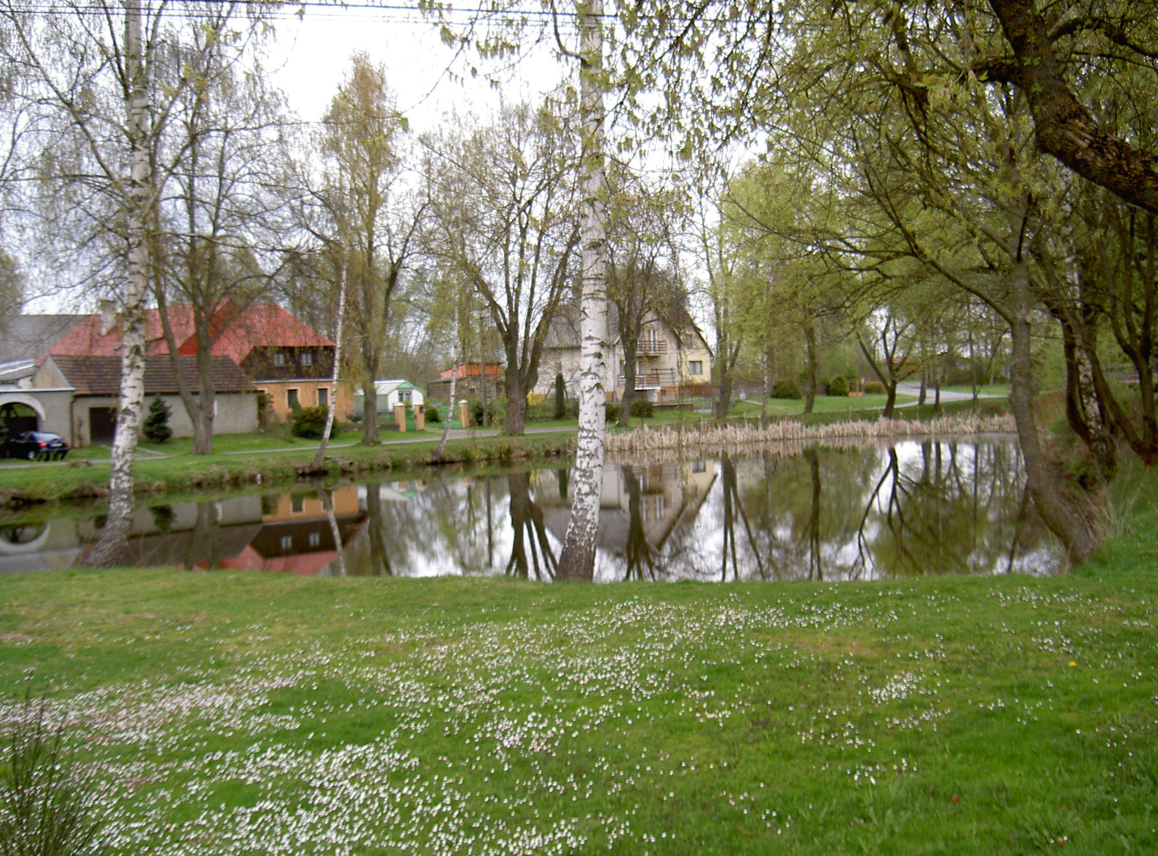 Třemešné (Zemschen)